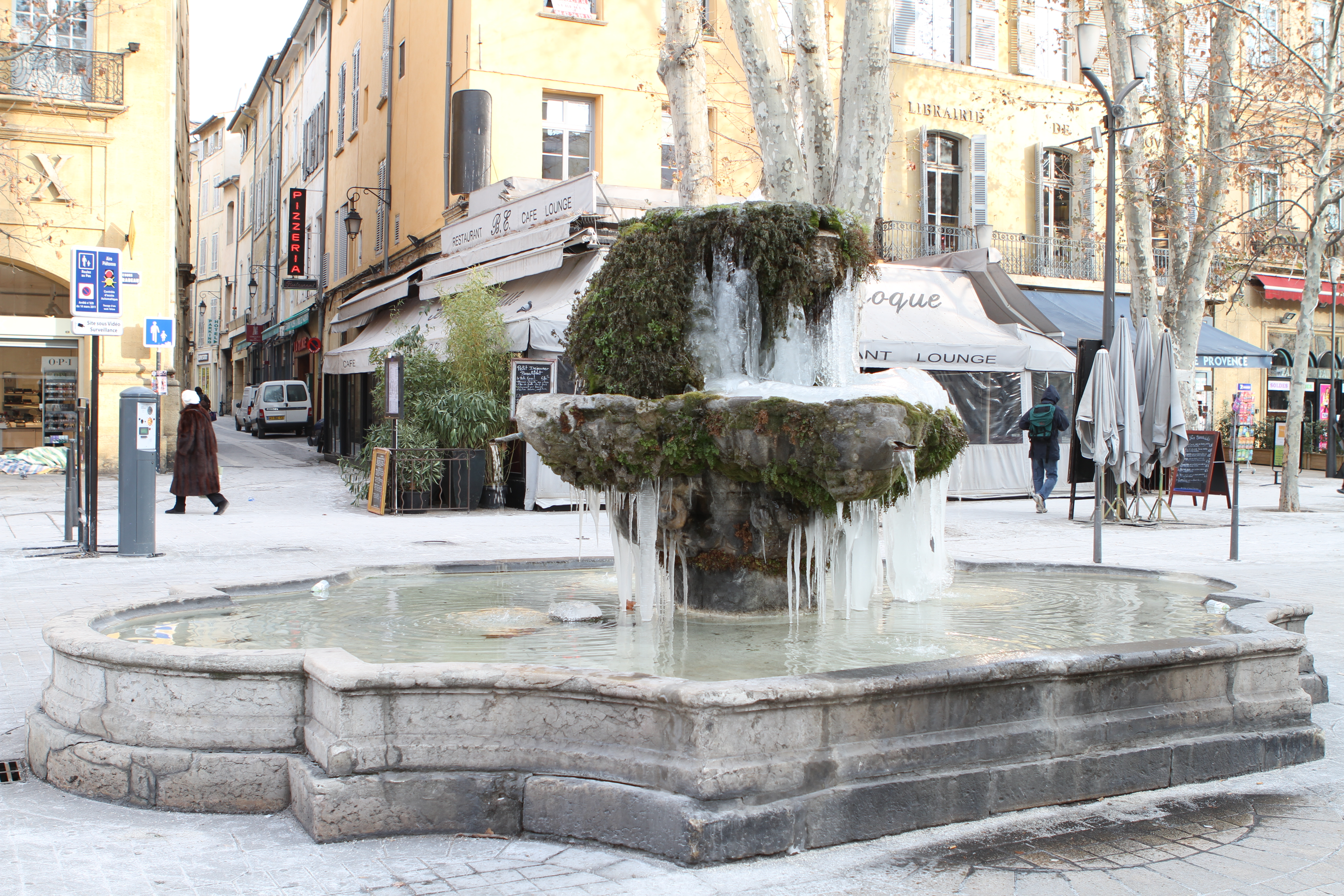 Une fontaine sur le cours Mirabeau à Aix-en-Provence (Bouches-du-Rhône, France)